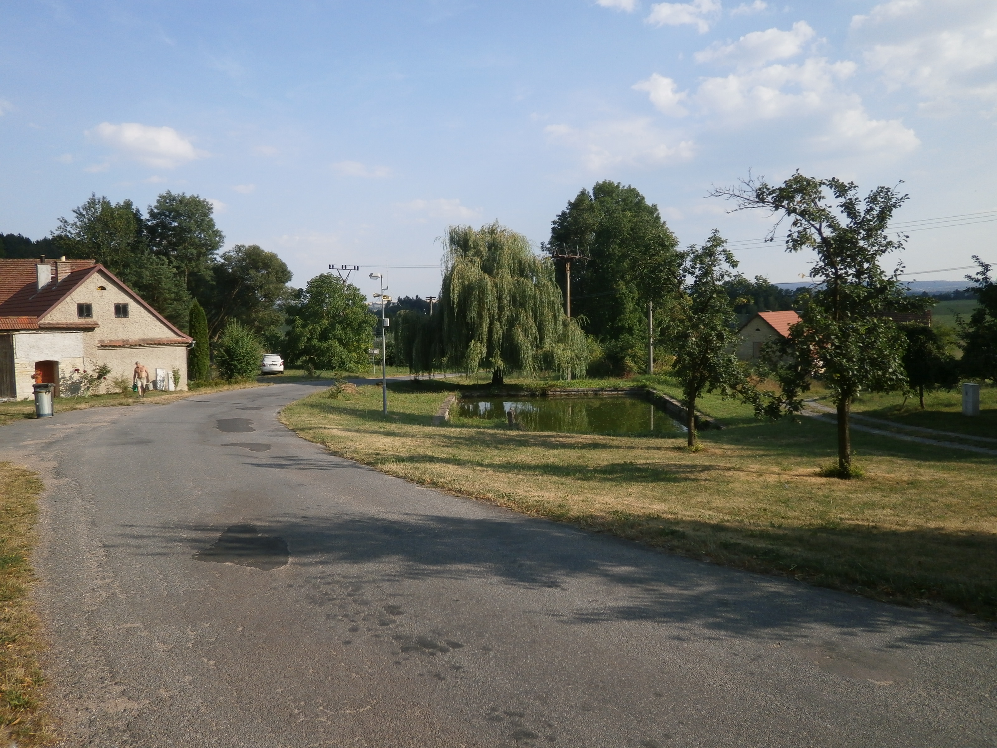 Podhořany - náves